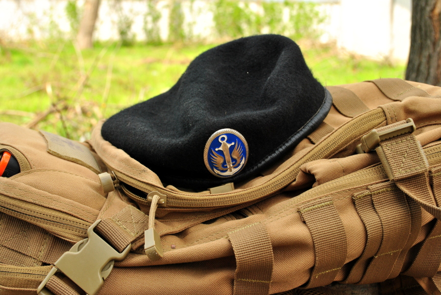 Marines/ Берет и рюкзак украинского морпеха